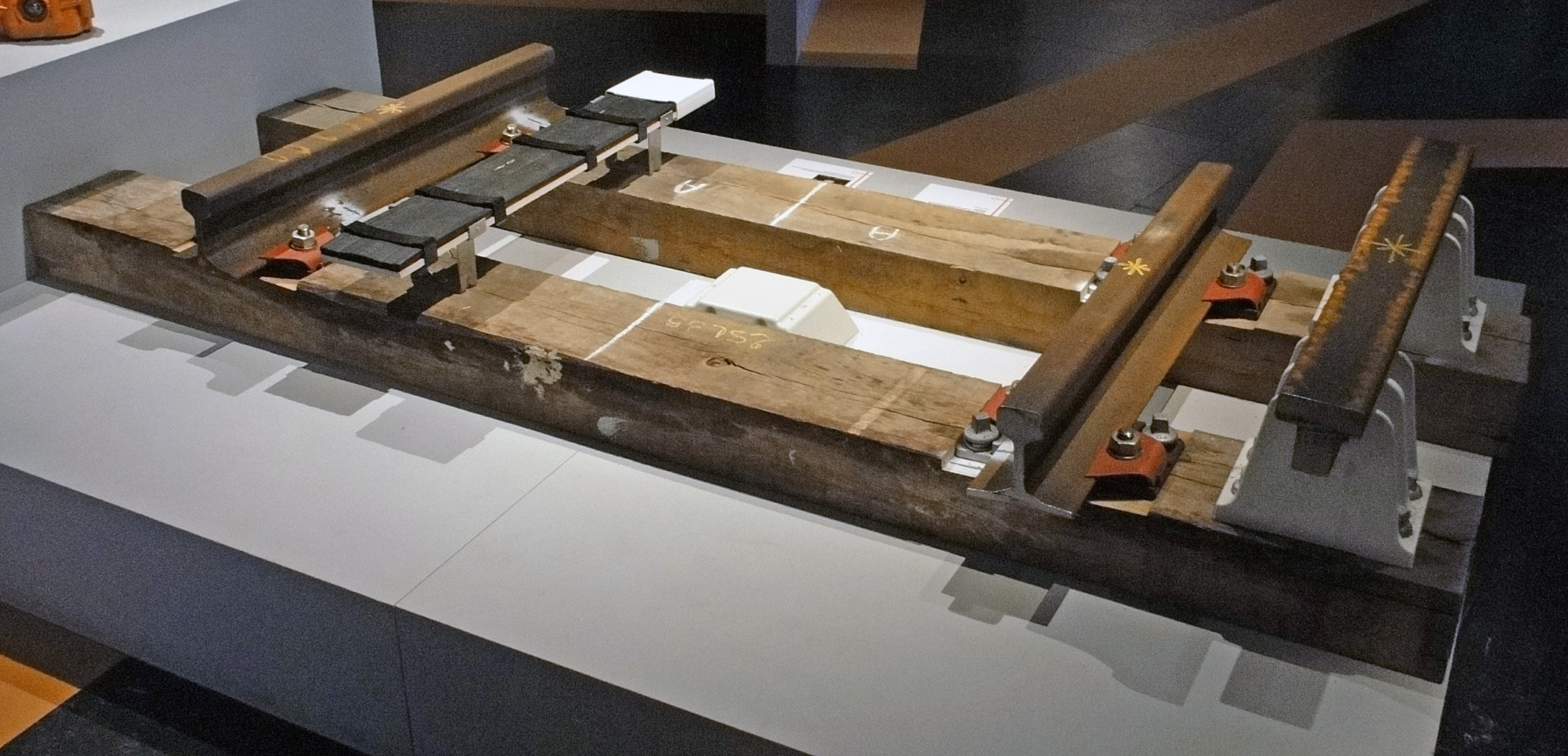 Tapis de pilotage automatique (PA) du métro de Paris, France.